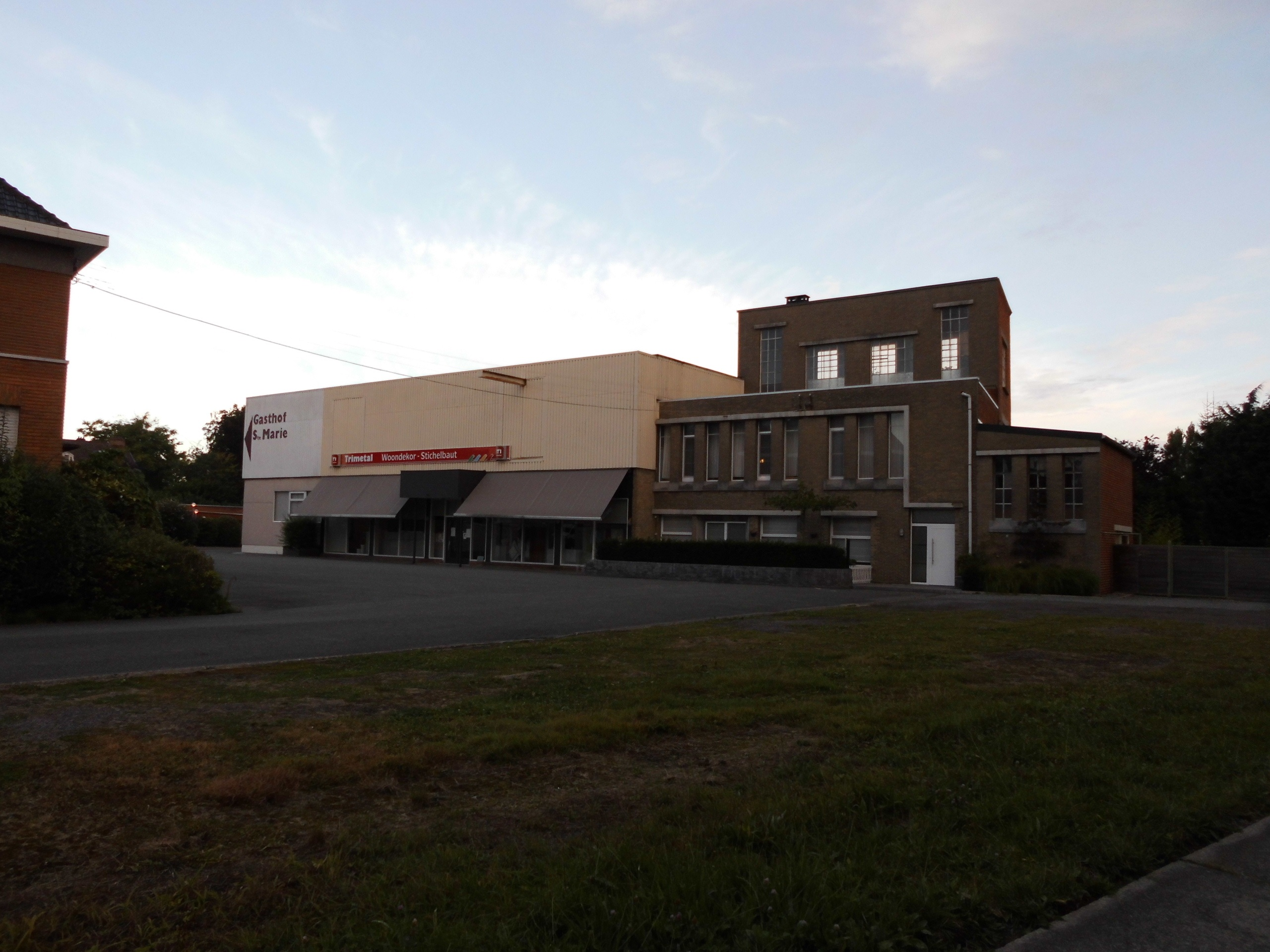 Voormalige Melkerij Sint-Marie - Gentse Steenweg - Maldegem - Oost-Vlaanderen - België